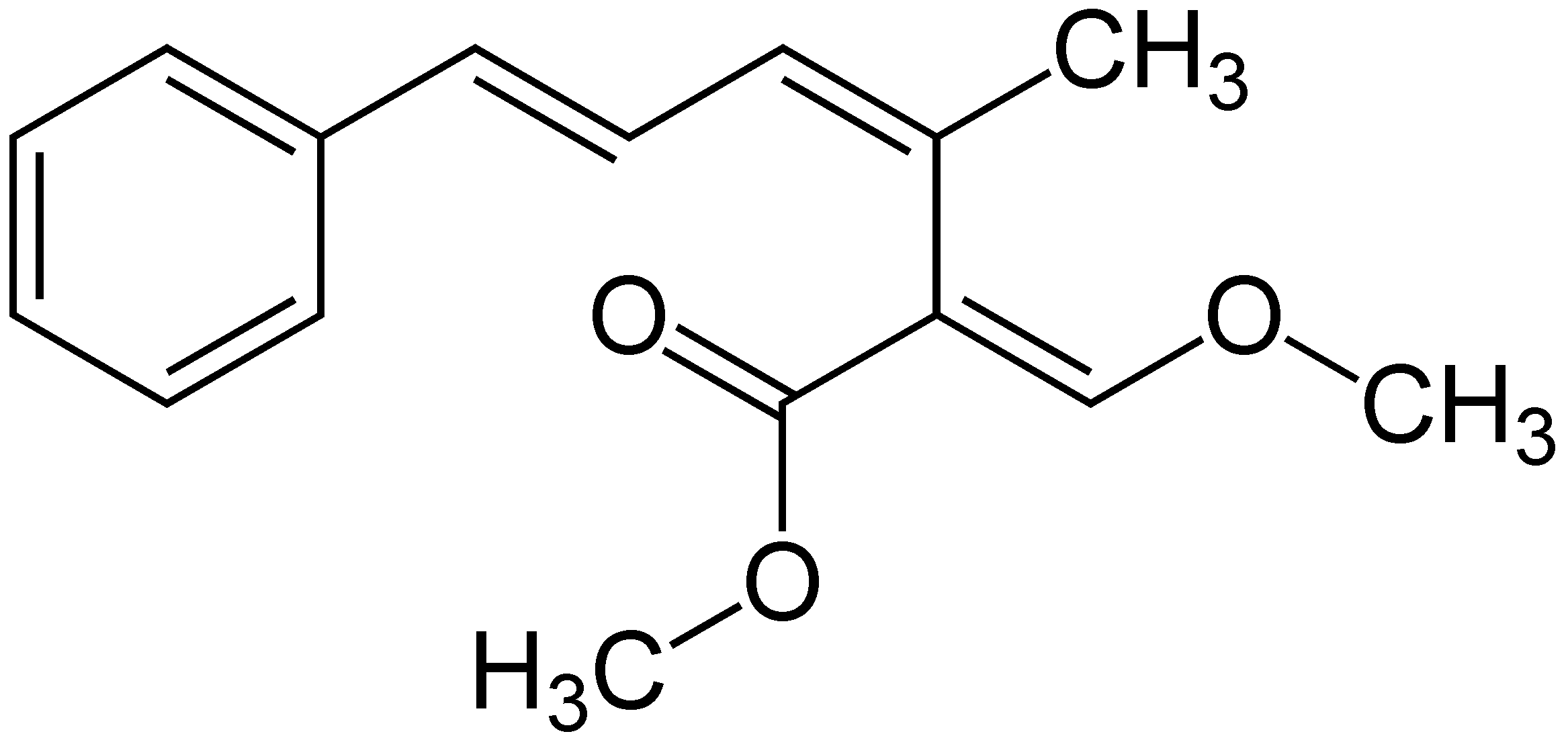 Strobilurin A Formulae